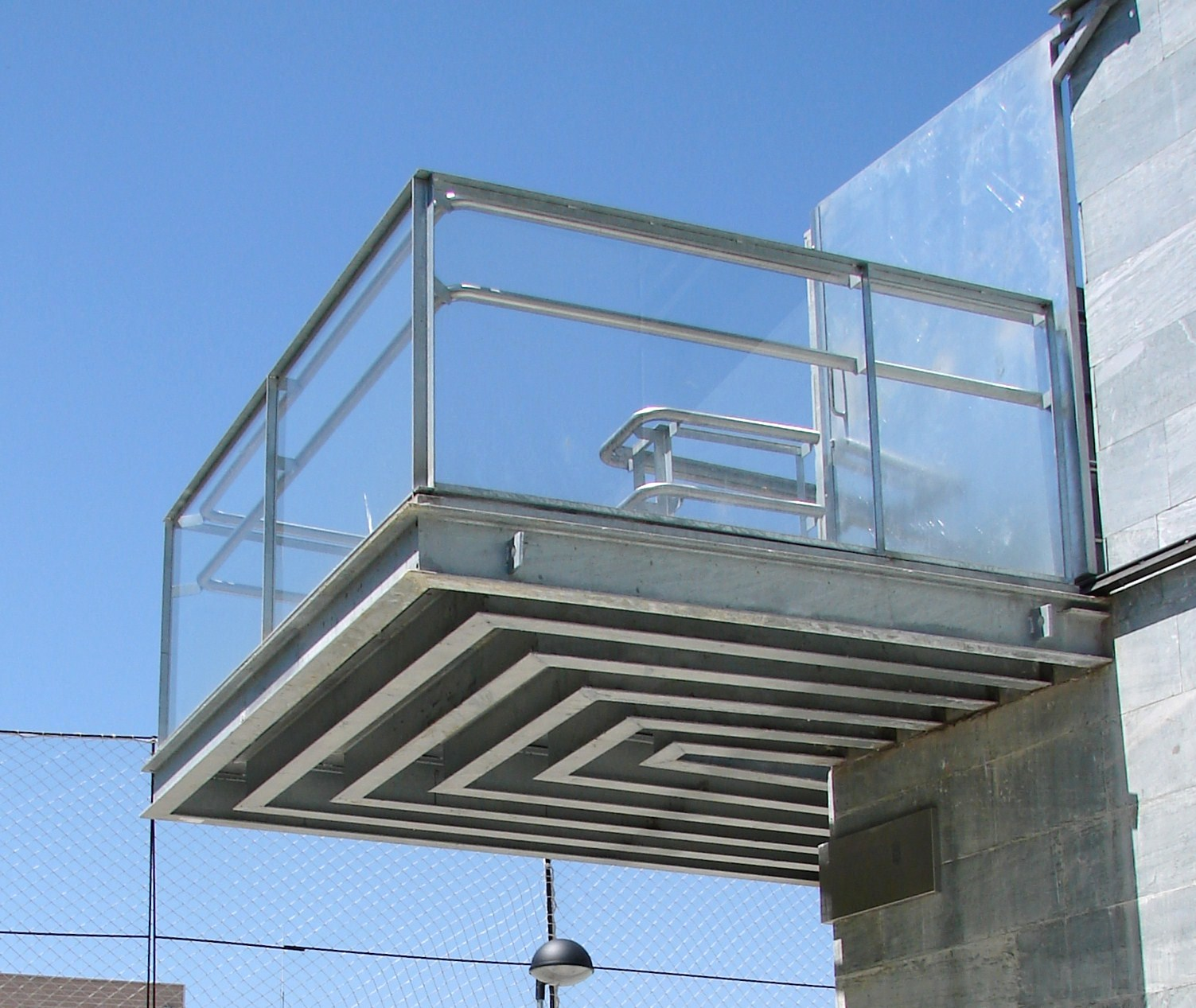 Biblioteca Municipal. Public Library "Lope de Vega" de Tres Cantos (Madrid)